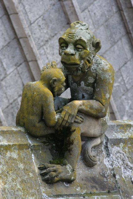 Luchtboogbeeldje op de Sint Janskathedraal, Den Bosch